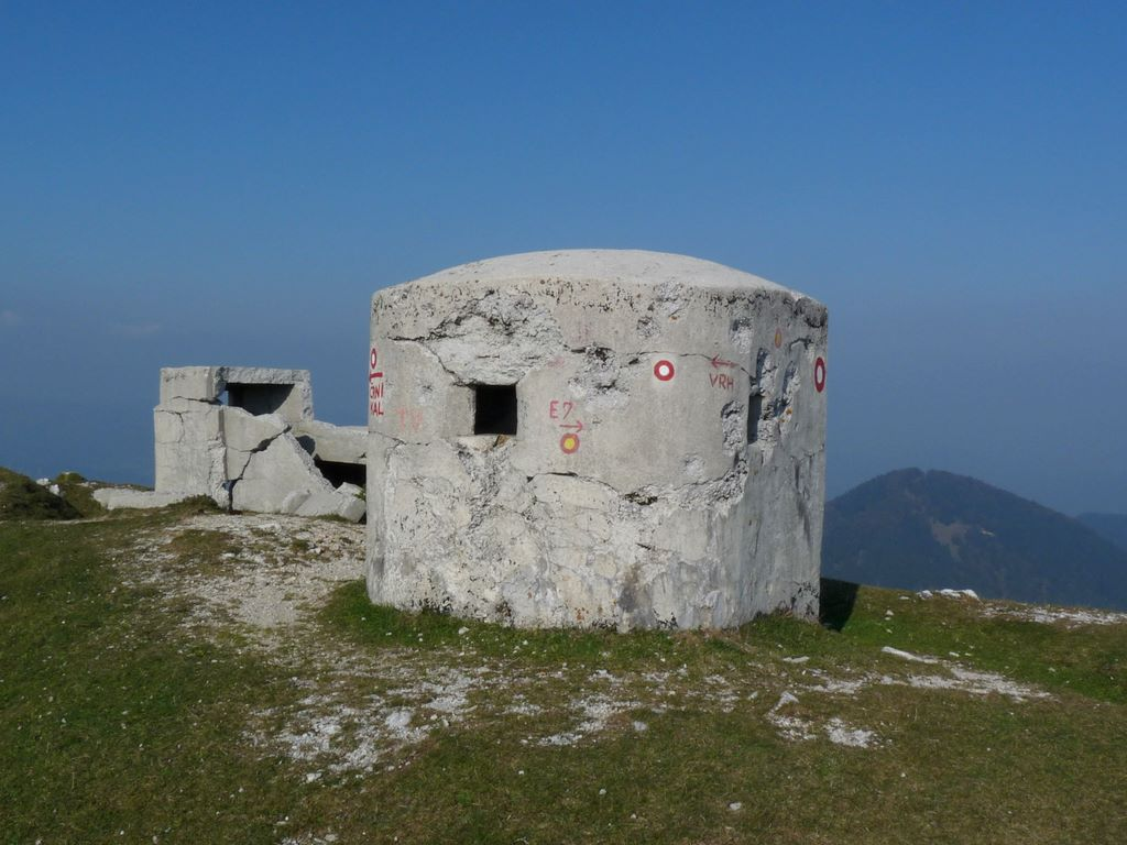 Bunker Rupnikove linije na Blegošu